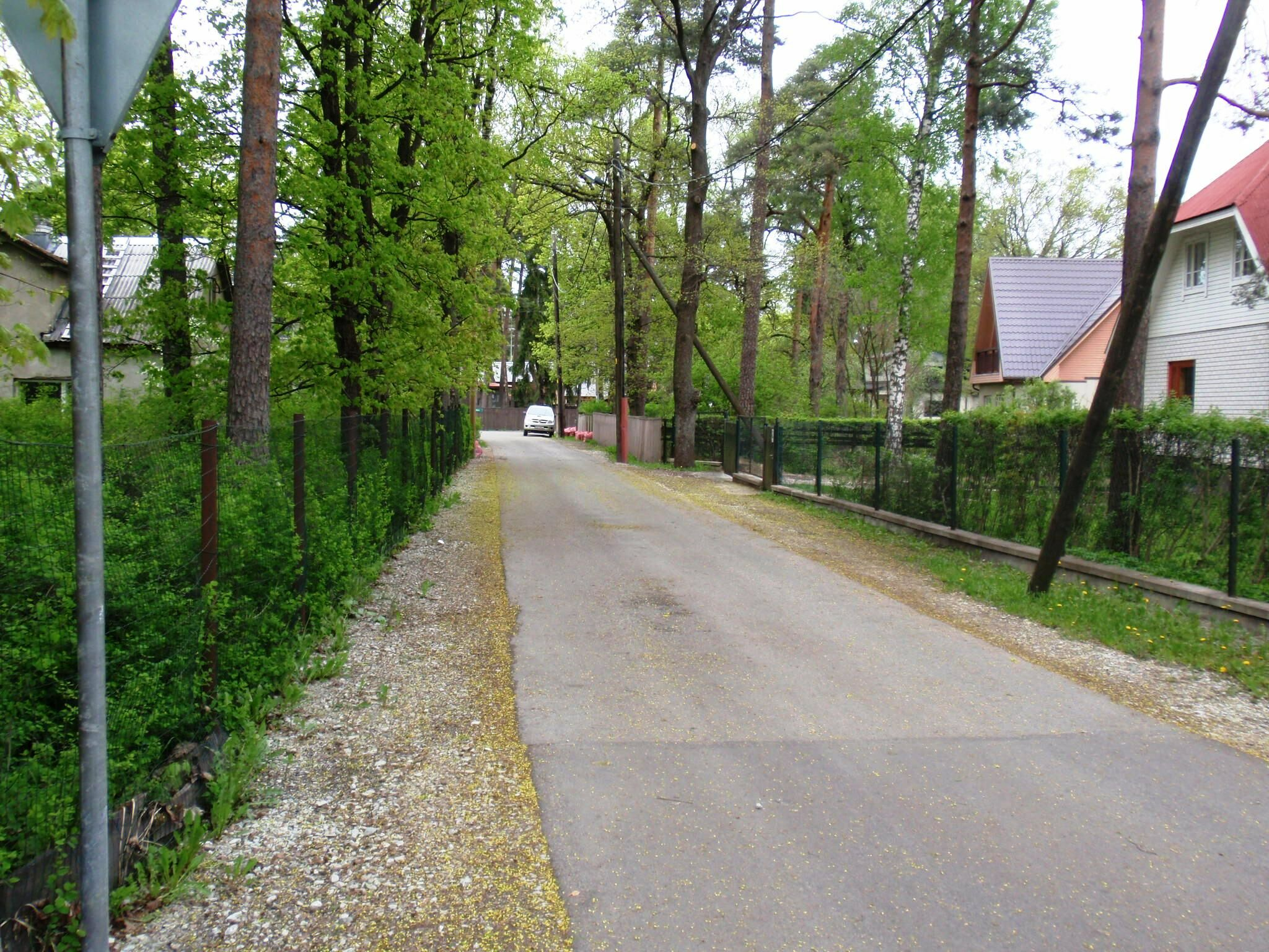 Muru tänav Tallinnas Nõmmel.